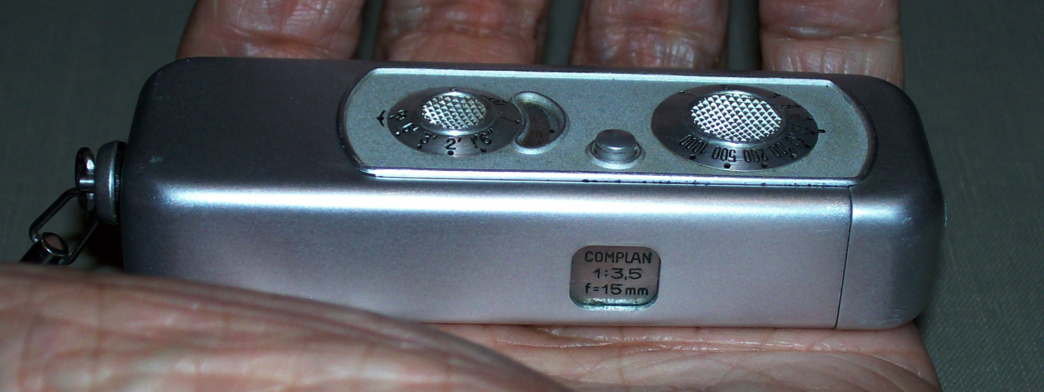 Minox IIIs in palm